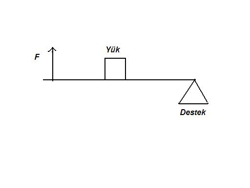 Bir tür kaldıraç. Bu kaldıraçta kuvvet kolu, yük kolundan uzundur. O yüzden, yükü kaldırmak için daha az kuvvet uygulanmalıdır.